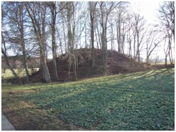 Der Burgstock, ein mit Bäumen bewachsener Hügel (im Hintergrund), bei Untereggatsweiler.